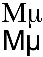 greek letter mu